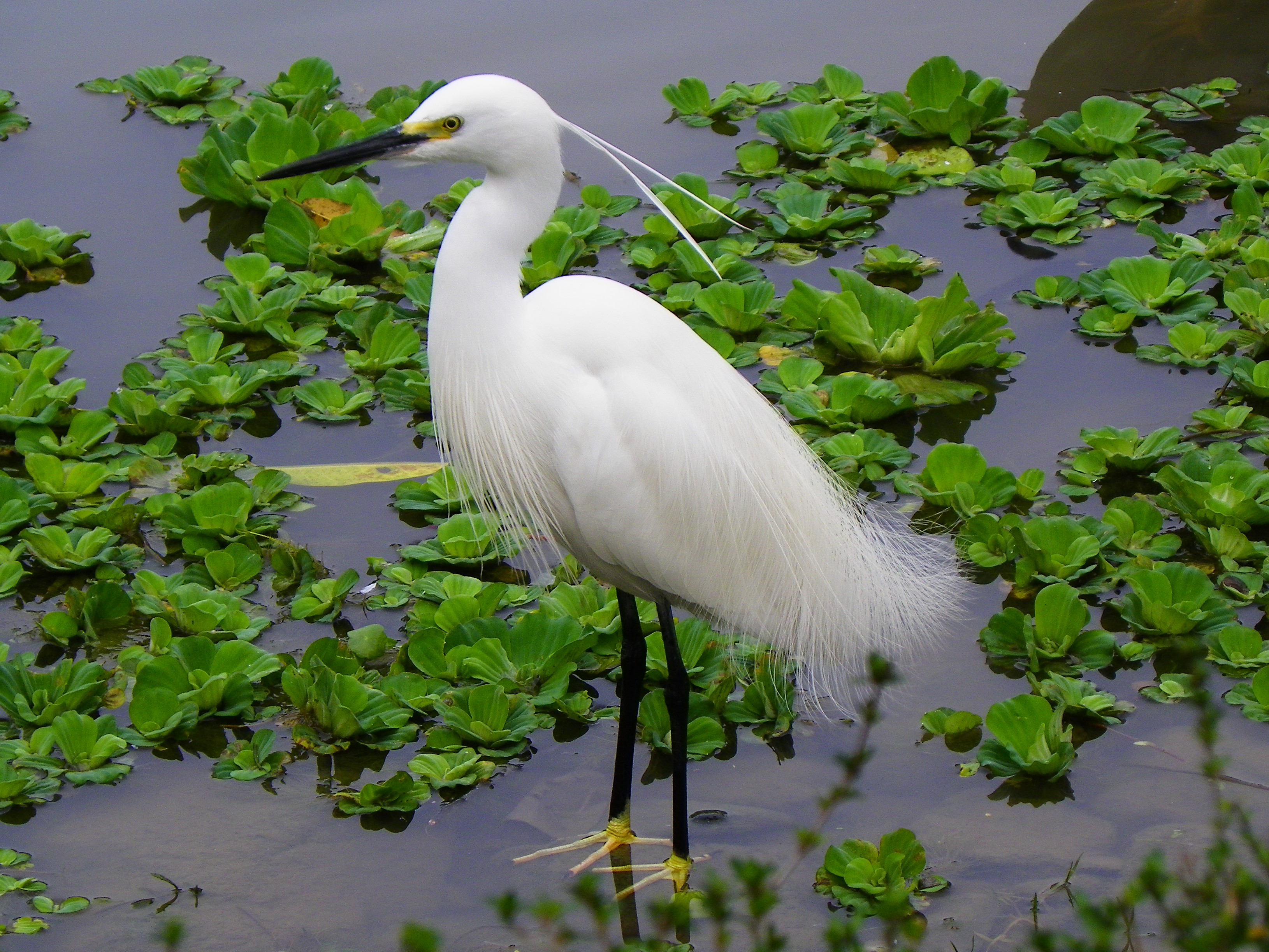 台北市大安区大安森林公園の池ほとり湿地のコサギ。